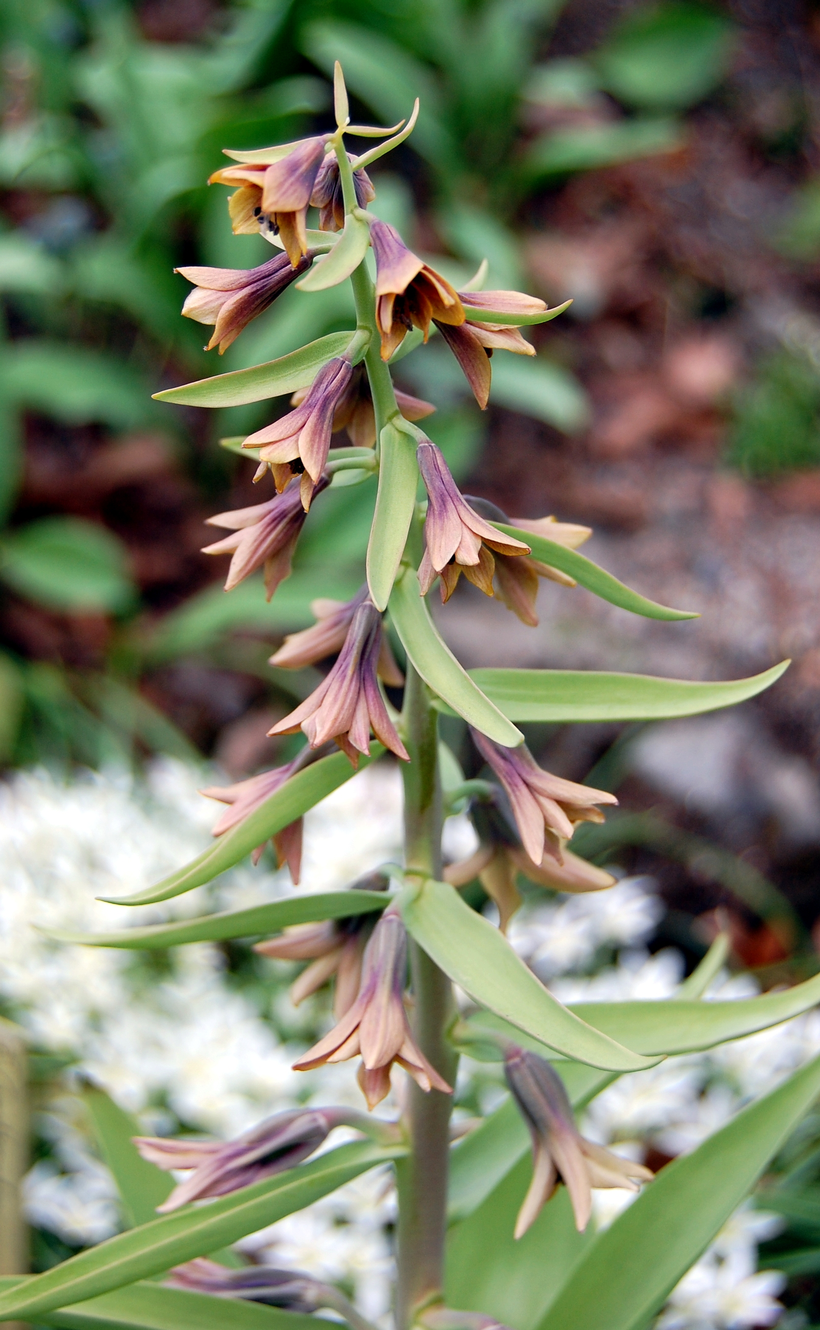 Fritillaria sewerzowii (Fritillaria discolor)